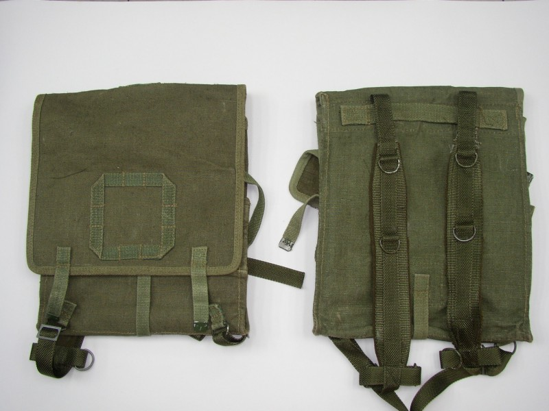 plecaki typu "kostka" autor: Patryq